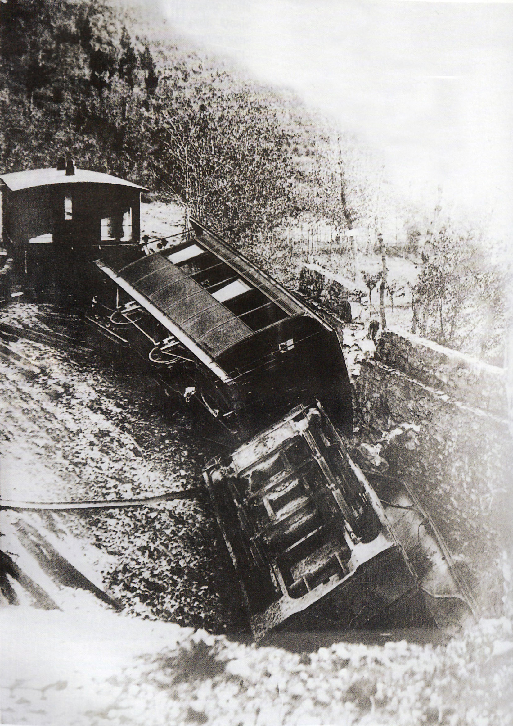 Incidente sulla Tramvia del Chianti del 13 novembre 1907